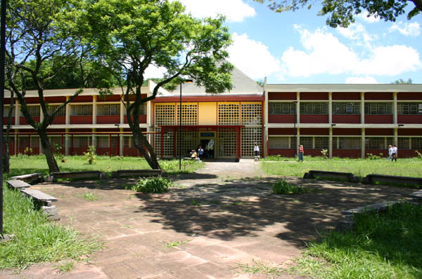 Instituto de Psicologia da Universidade de São Paulo (Bloco D). Foto tirada por Usuário:J Kikuchi em 12/11/2004 12:24:48.